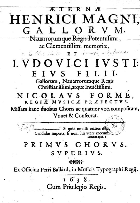 Title page of N. Formé's Missa duobus choris, 1638.